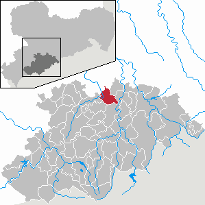 Amtsberg im Erzgebirgskreis, Sachsen